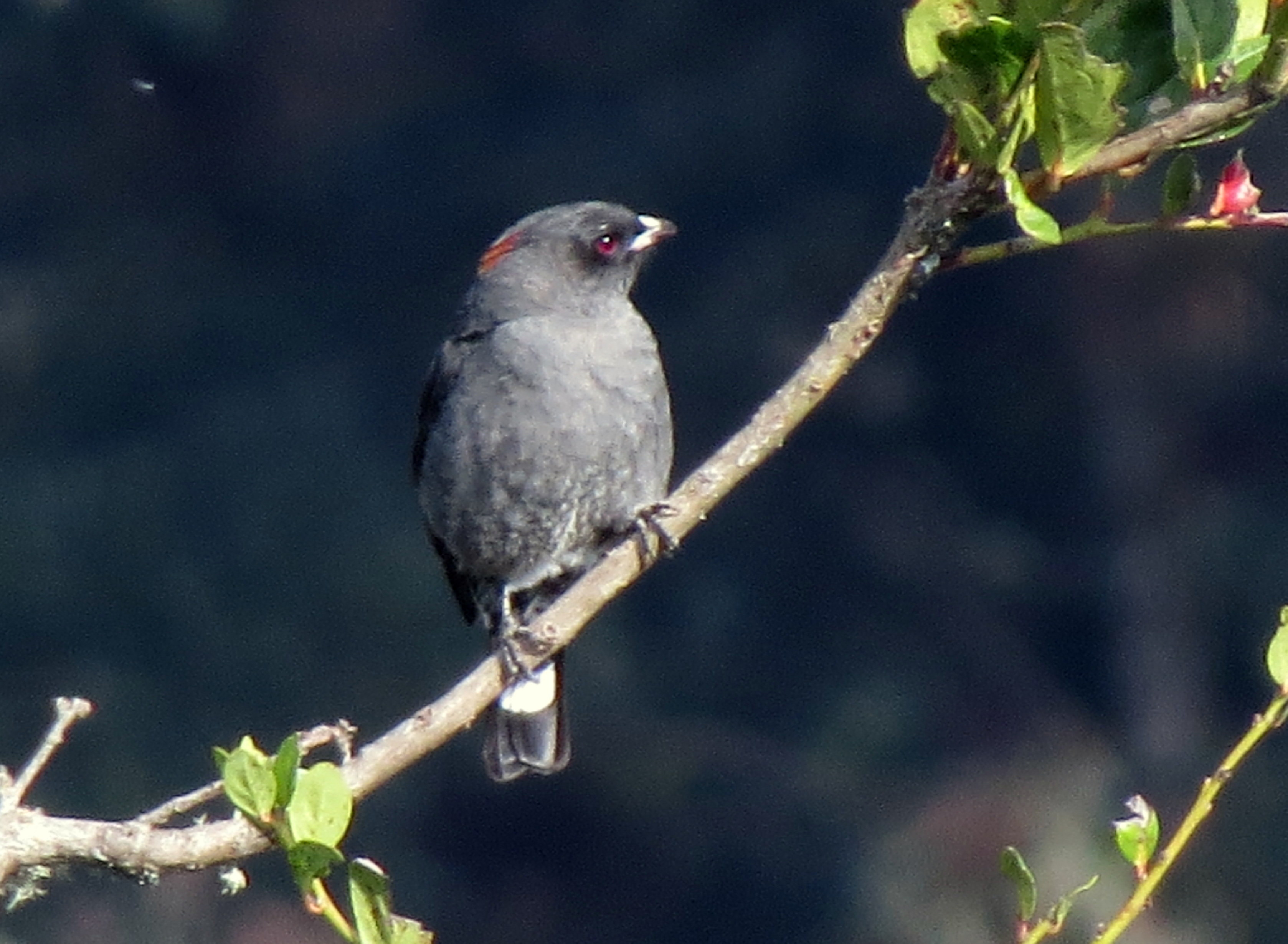 Ampelion rubrocristata (Cotinga crestirroja)